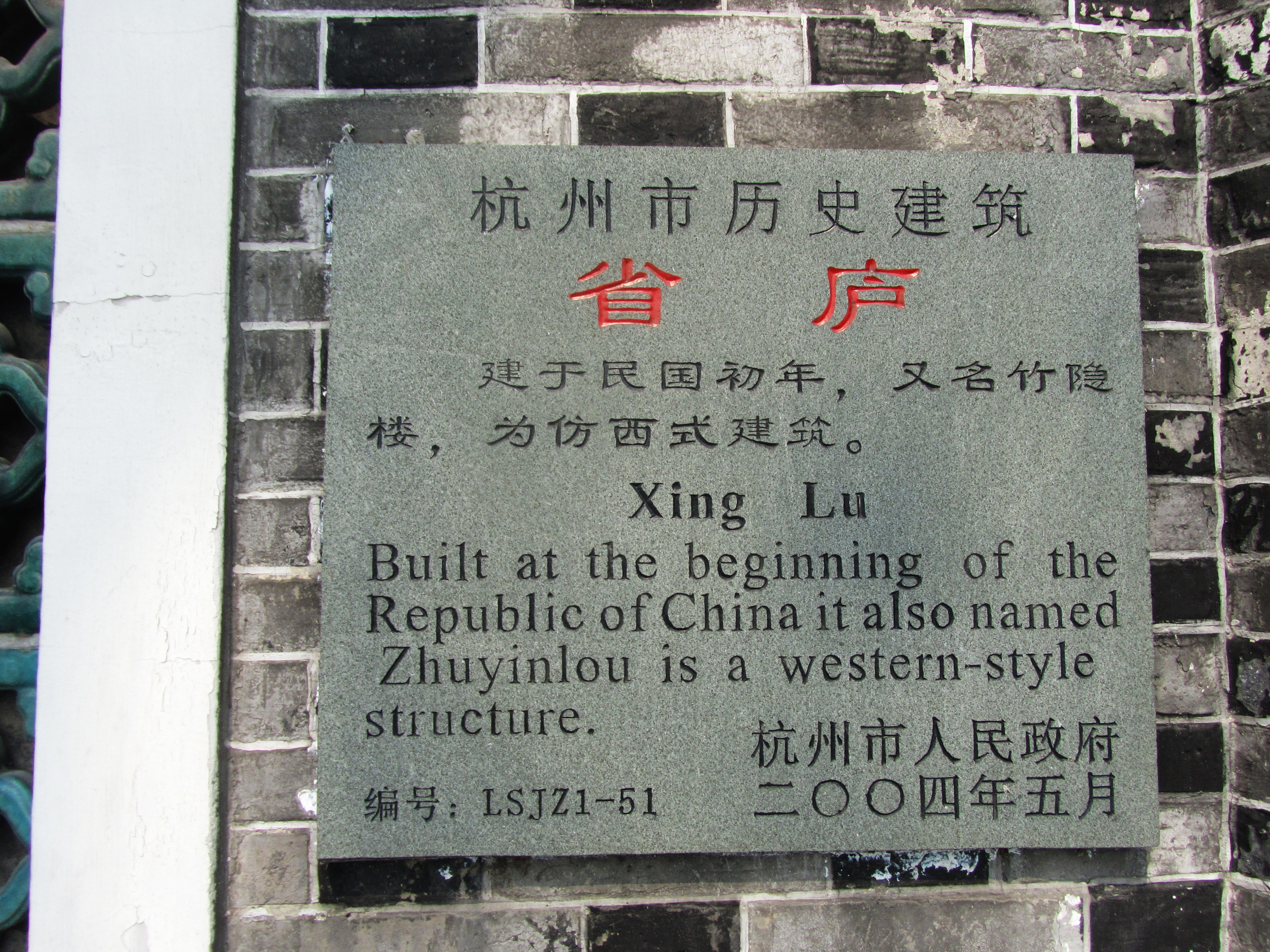 省庐，杭州市历史建筑，标识牌。